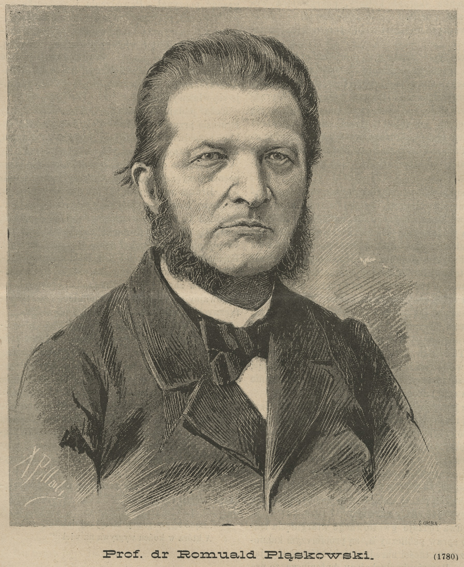 Prof. dr Romuald Pląskowski